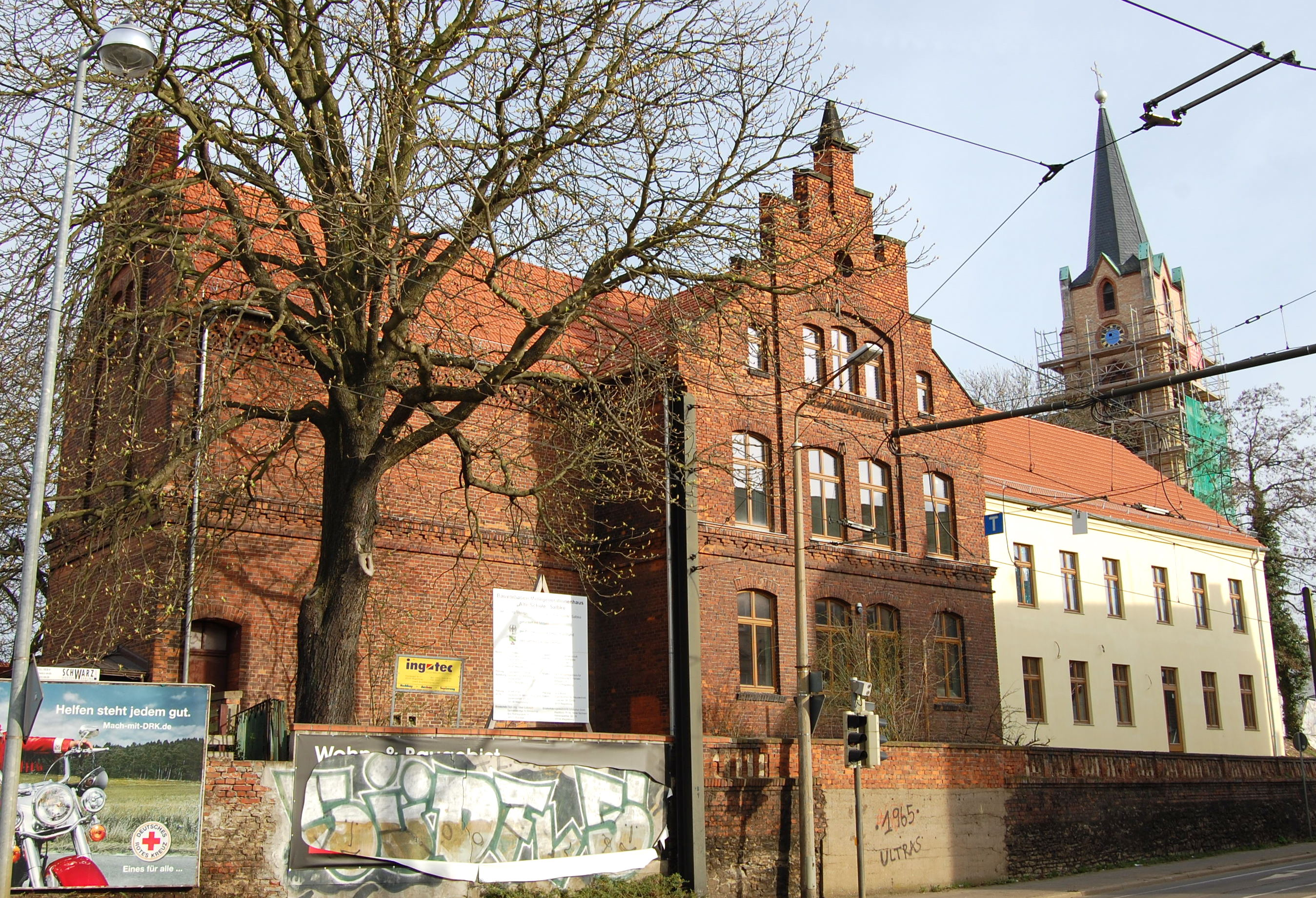 Alte Schule Salbke, Straßenseite zur Straße Alt Salbke